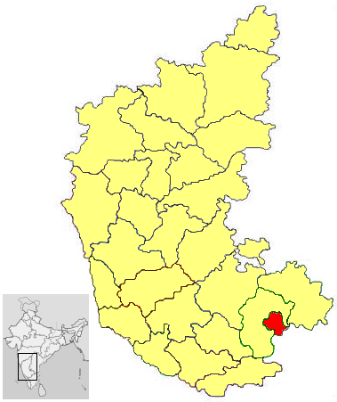 district in Karnataka